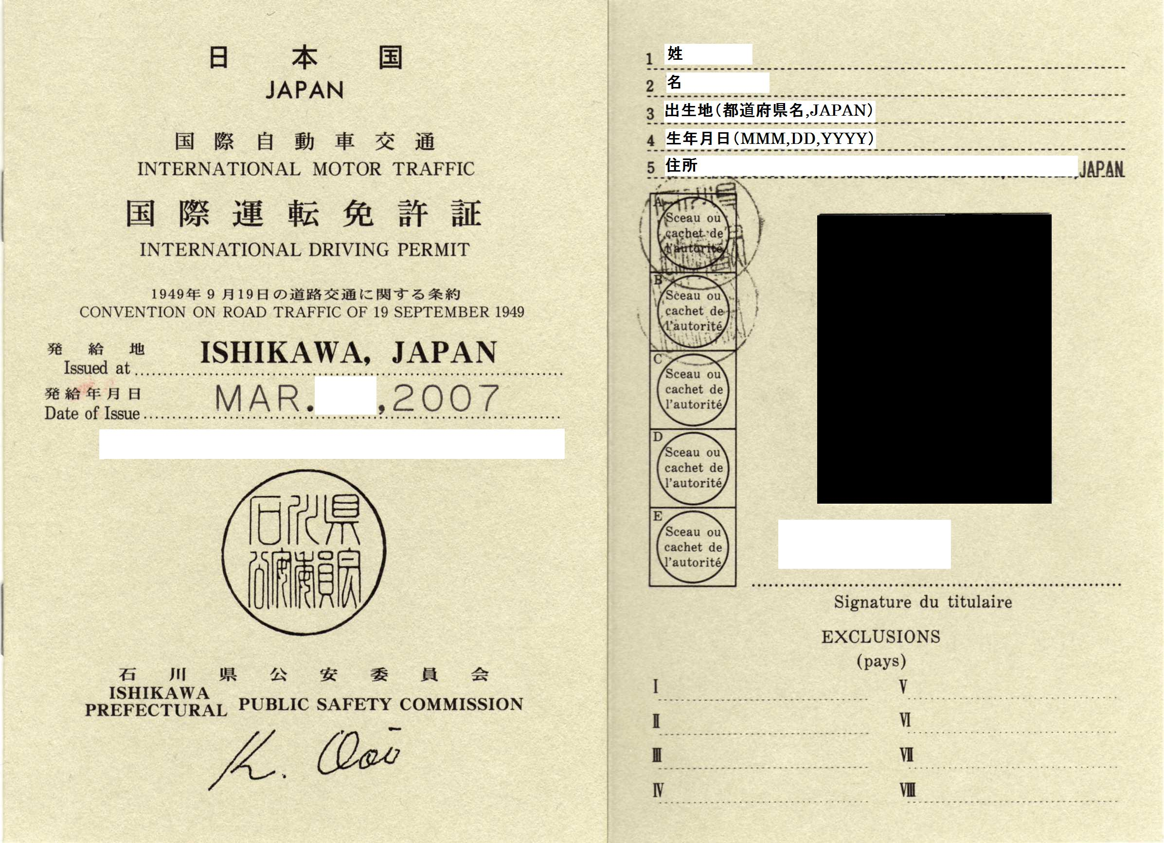 2007年3月31日、投稿者の国際運転免許証の表紙と最終葉をスキャナーでスキャン。個人情報は加工した。